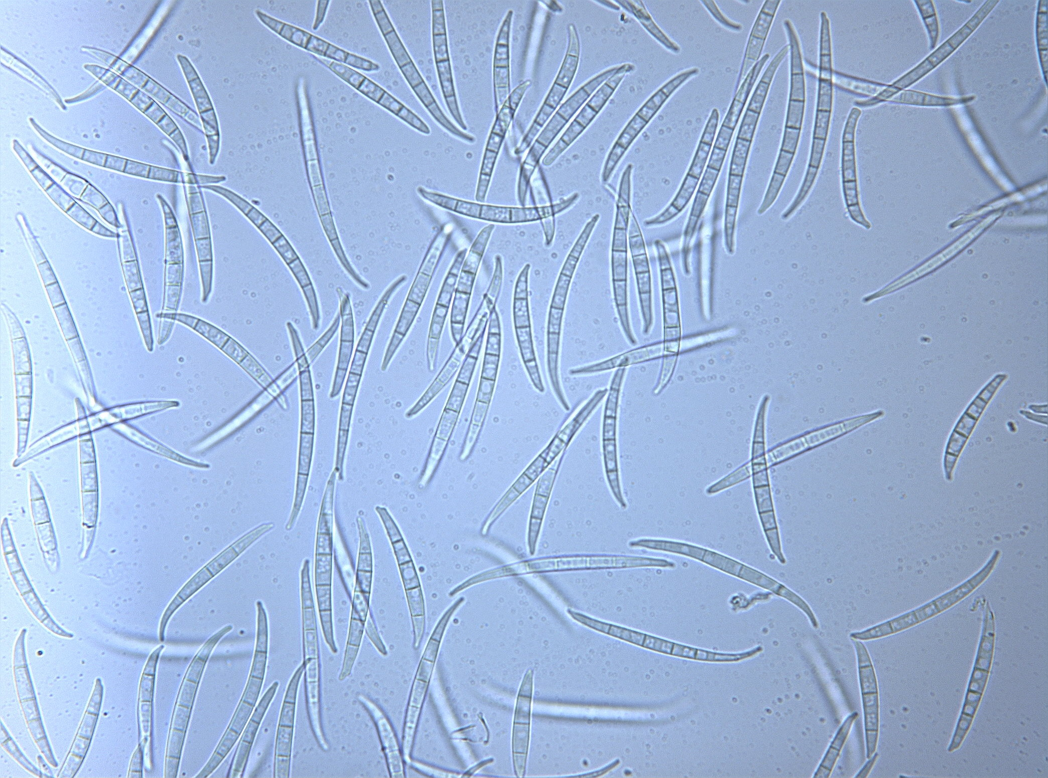 Makrokonidien eines Fusarium avenaceum unter 160-facher Vergrösserung